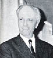 Giuseppe Grosso, sindaco di Torino - immagine ridimensionata digitalmente